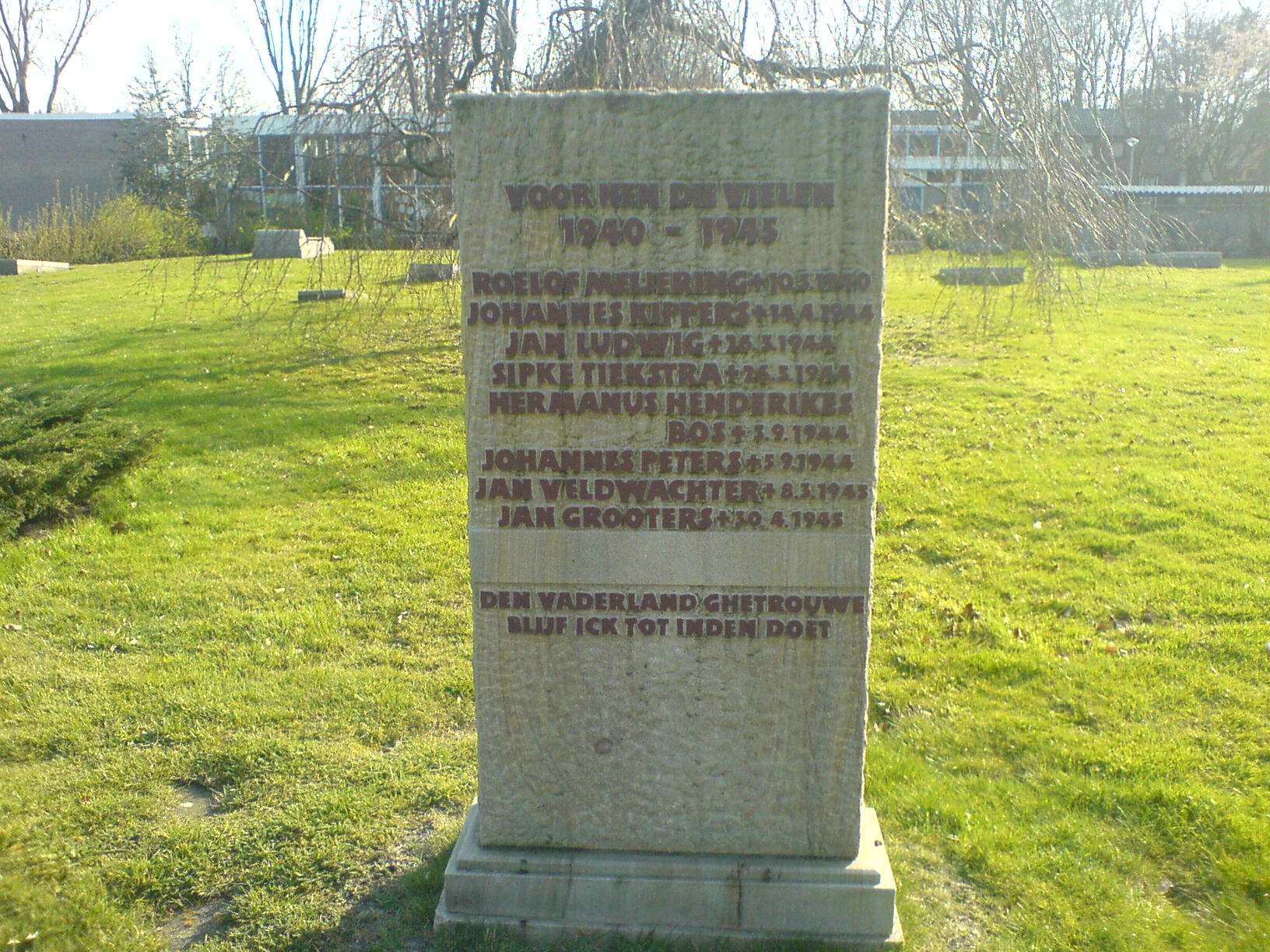 Gedenksteen aan de Europaweg aan de Europaweg (N863) tegenover nr. 114 in Schoonebeek.